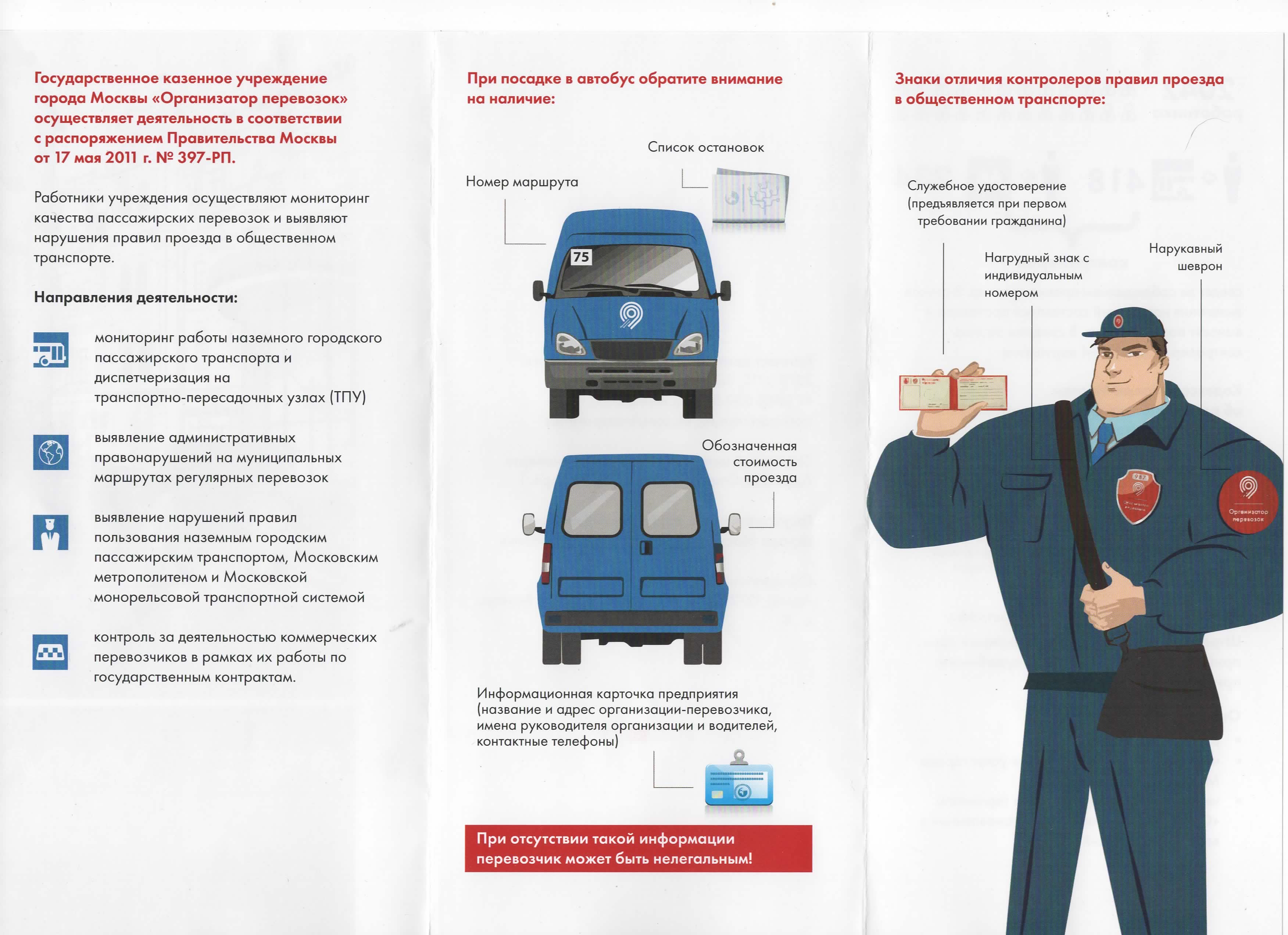 Отсканированная листовка о государственном казённом учреждении города Москвы «Организатор перевозок». Свободно распространялась в сервисном центре «Московский транспорт».